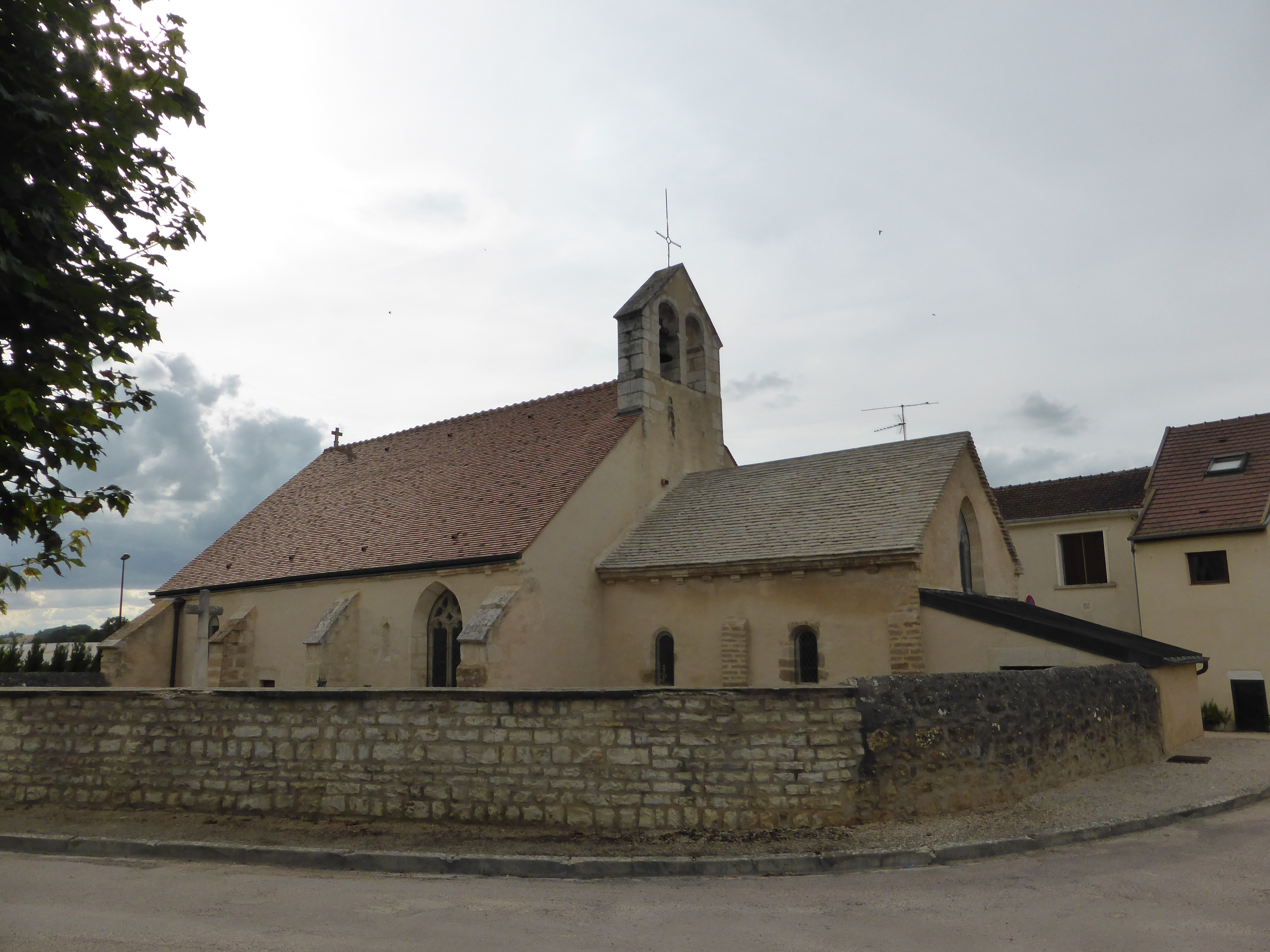 Église Saint-Gengoult d'Annéot